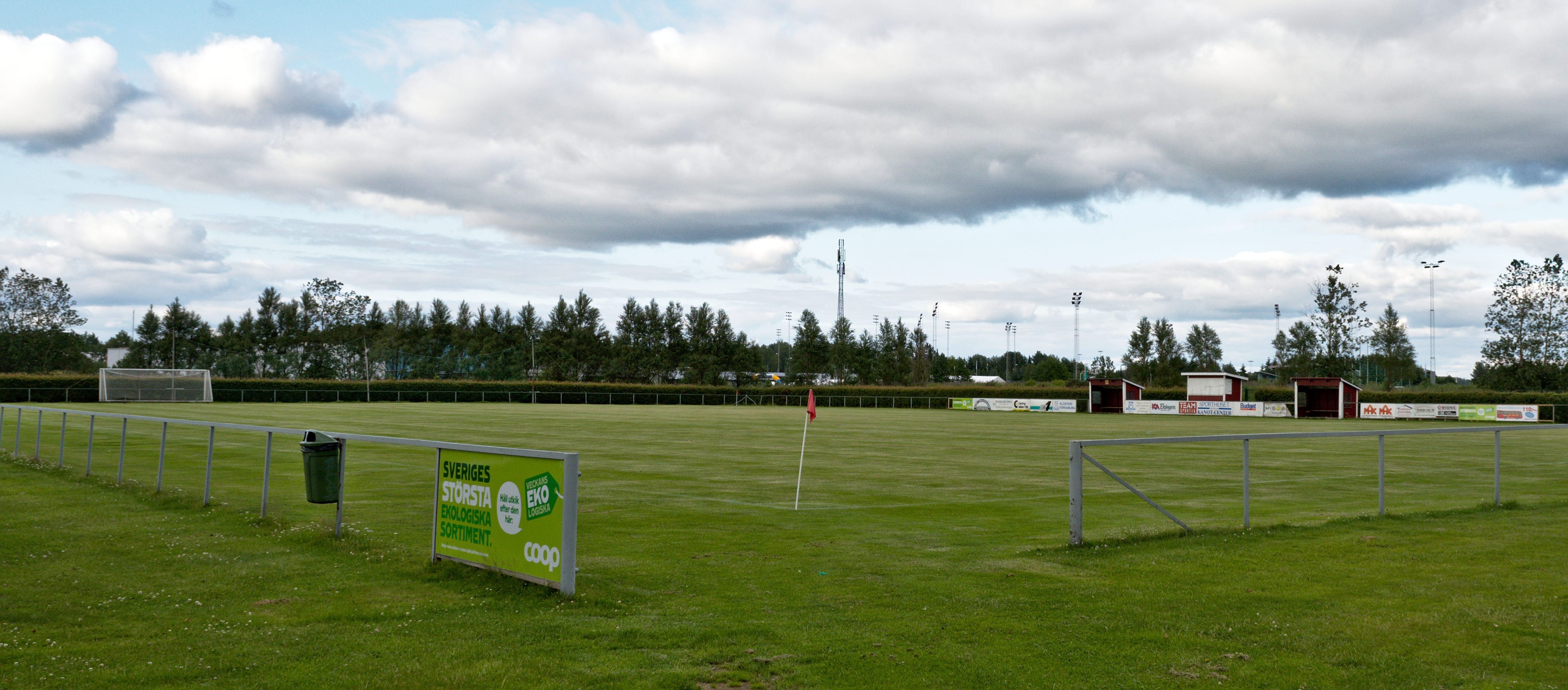 Gräsplanen vid Ekängen i Eskilstuna.